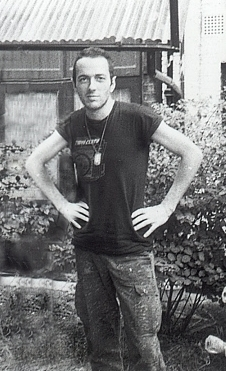 Joe Strummer - 37 lancaster road - Londres